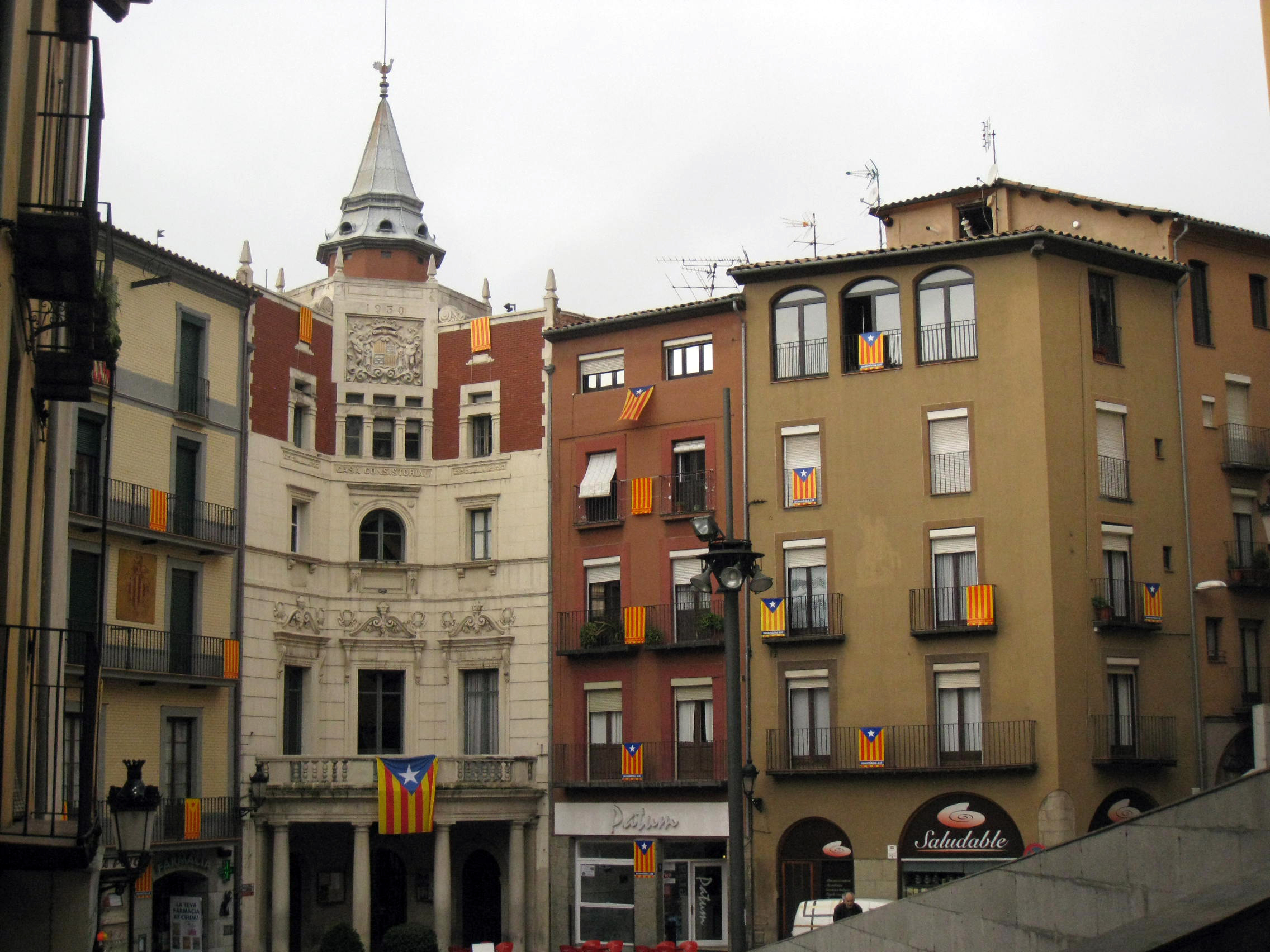 Conjunt de la plaça de Sant Pere (Berga) Object location42° 06′ 15.76″ N, 1° 50′ 46.14″ E